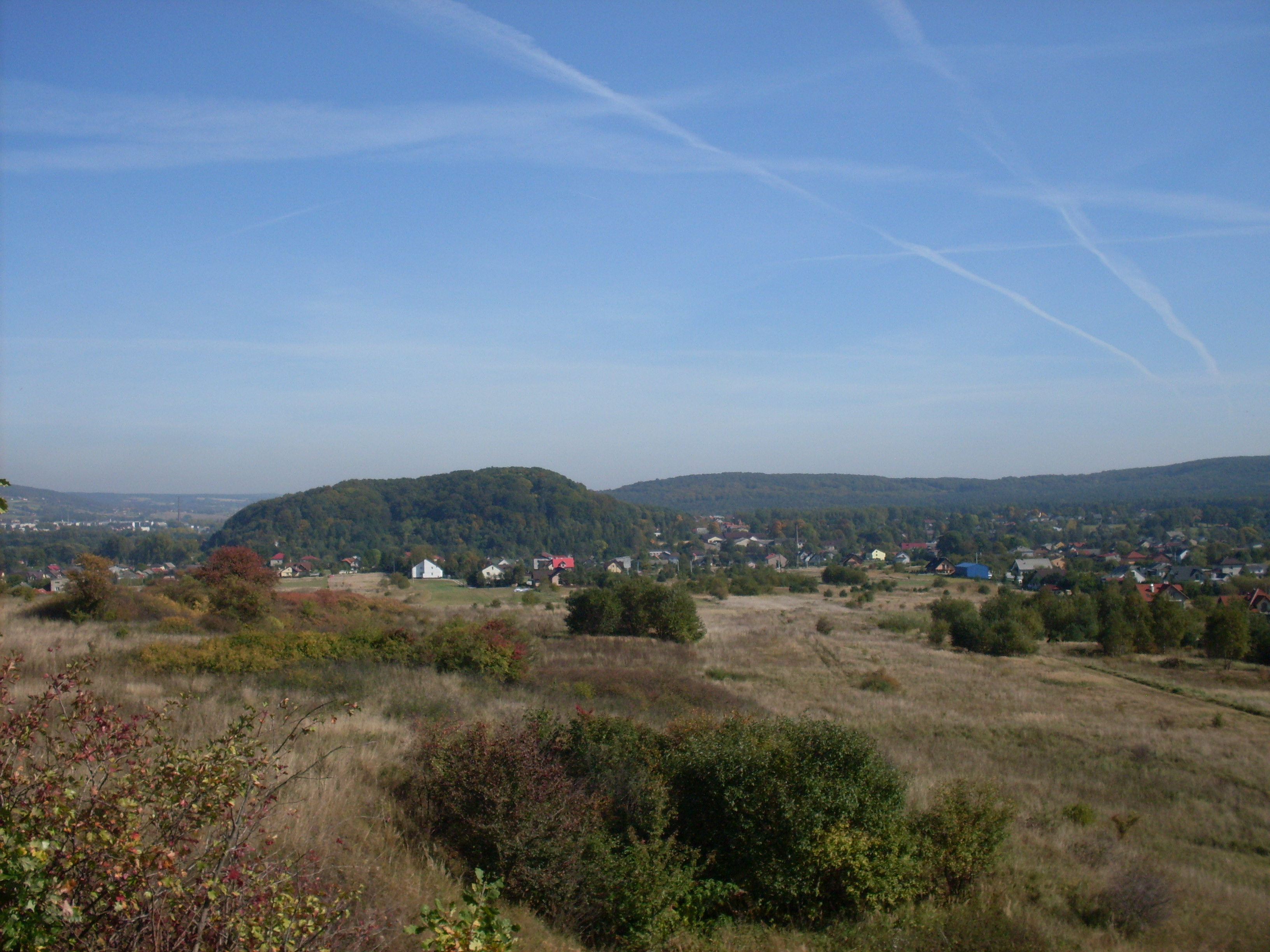 Tenczynek.Widok od str. zachodniej na Górę Buczyna od wzgórza Skałka.